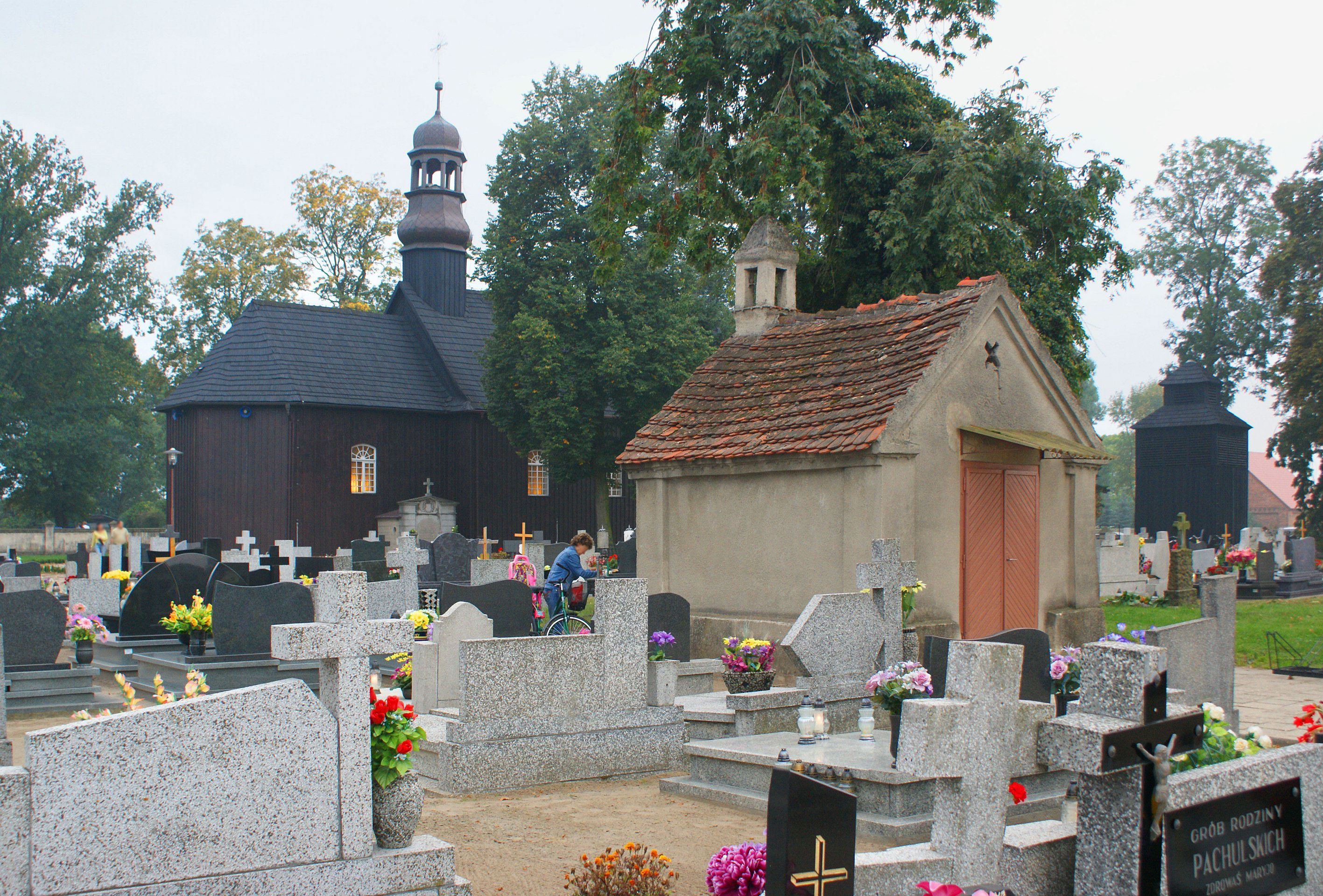 drewniany kościół parafialny pw. Narodzenia NMP z 1785 r., dzwonnica drewniana z 1948 r. Ociąż, Nowe Skalmierzyce IV-73/63/54.